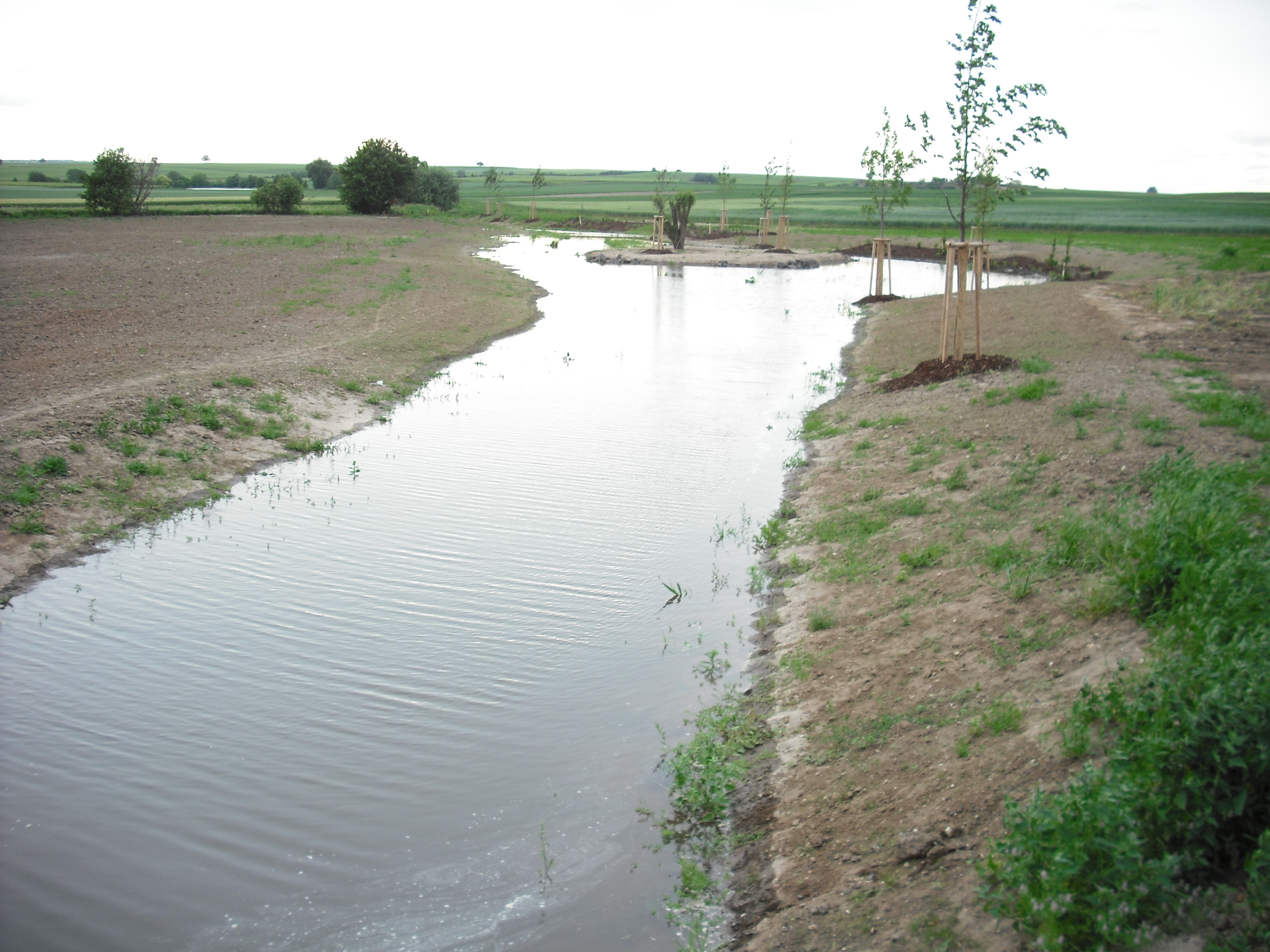 Floßbach in Dirmstein, anlässlich des Abschlusses der Renaturierung zu Testzwecken angestaut